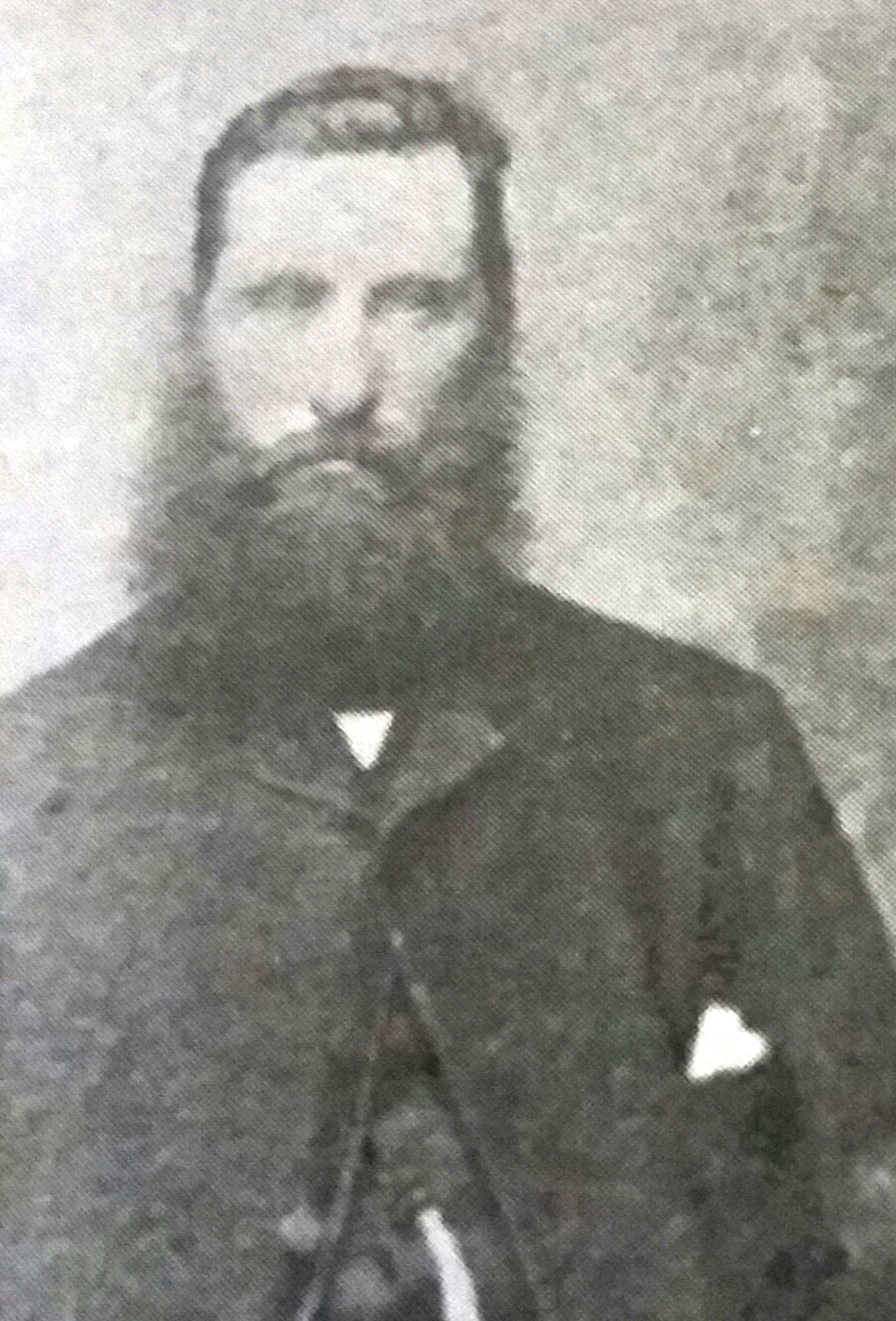 Kommandant Johannes de Lange, beter bekend as Hans Dons